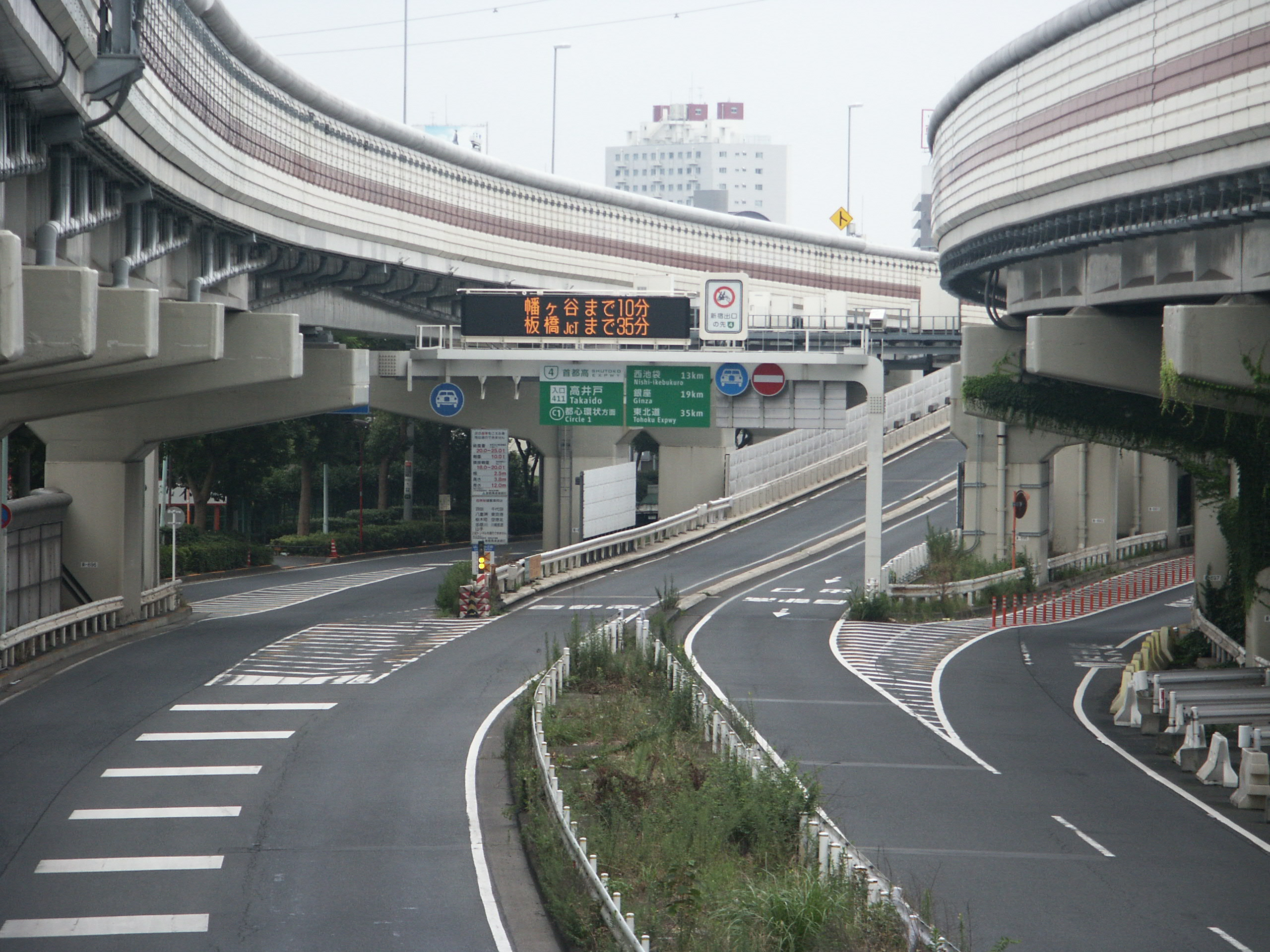 首都高速道路4号新宿線高井戸出入口